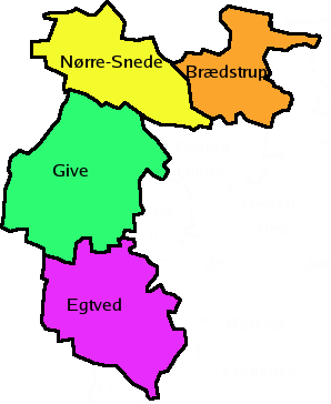 Givekredsen